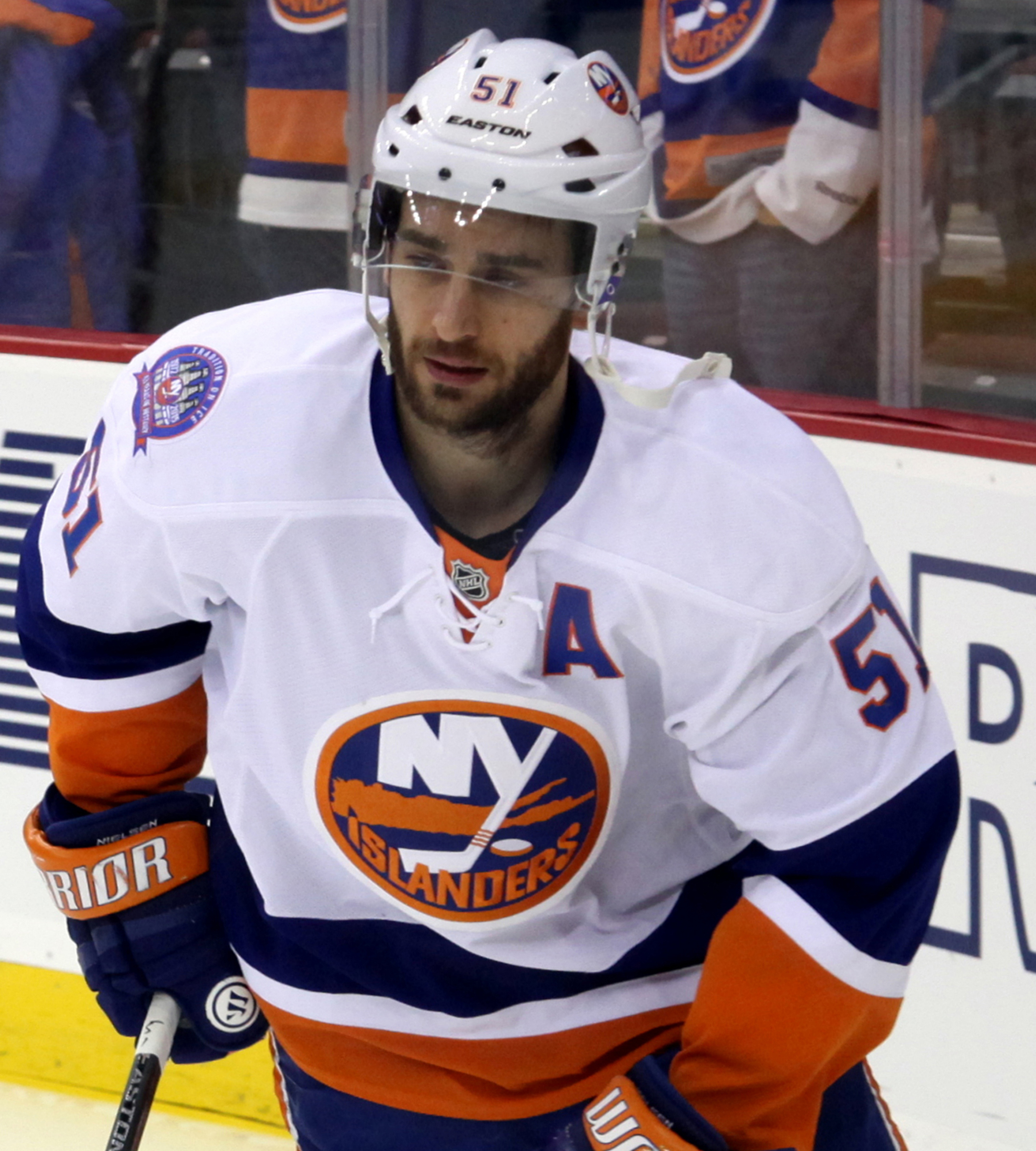 Frans Nielsen in January 2015.